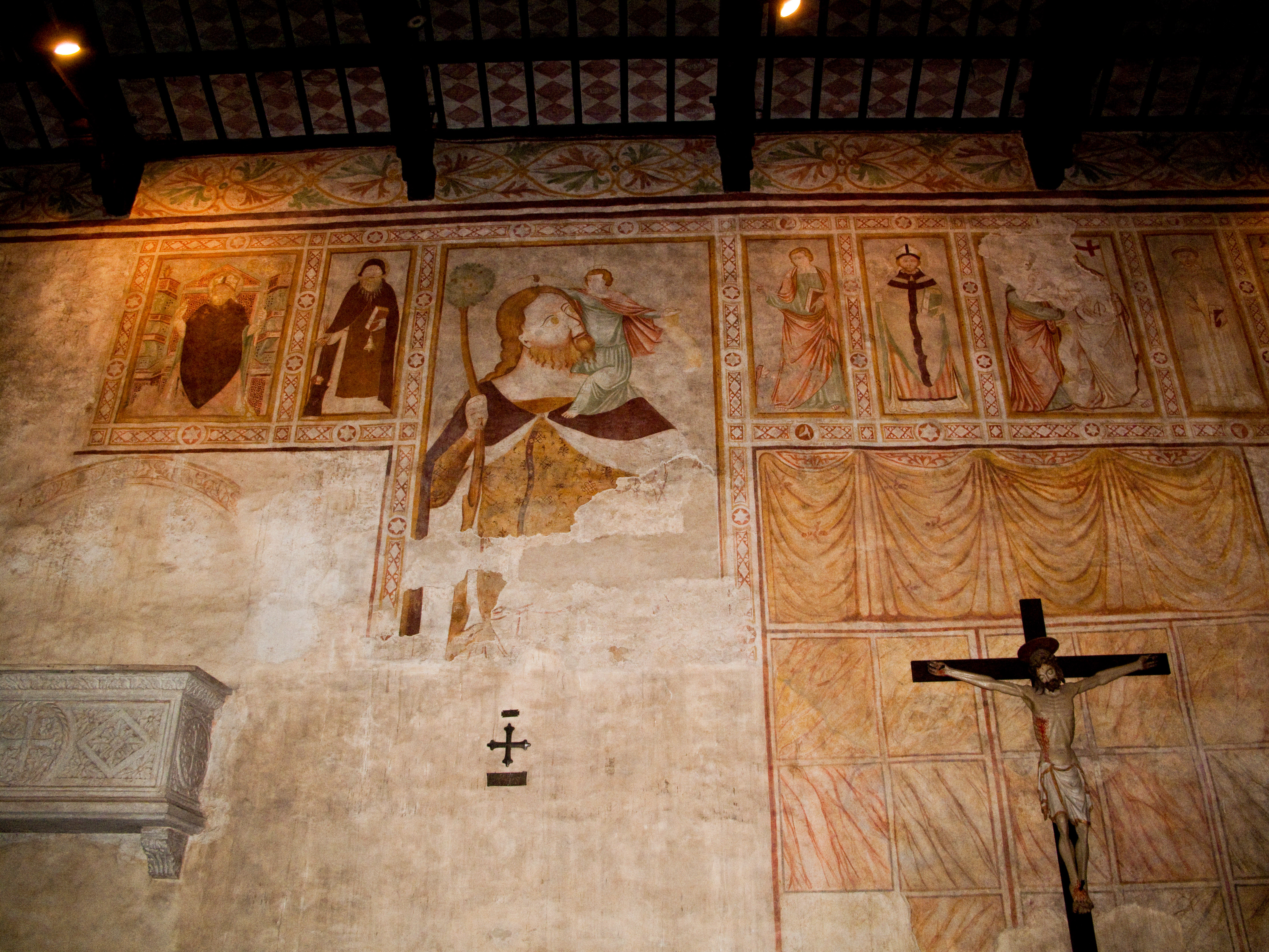 Affreschi parete sinistra